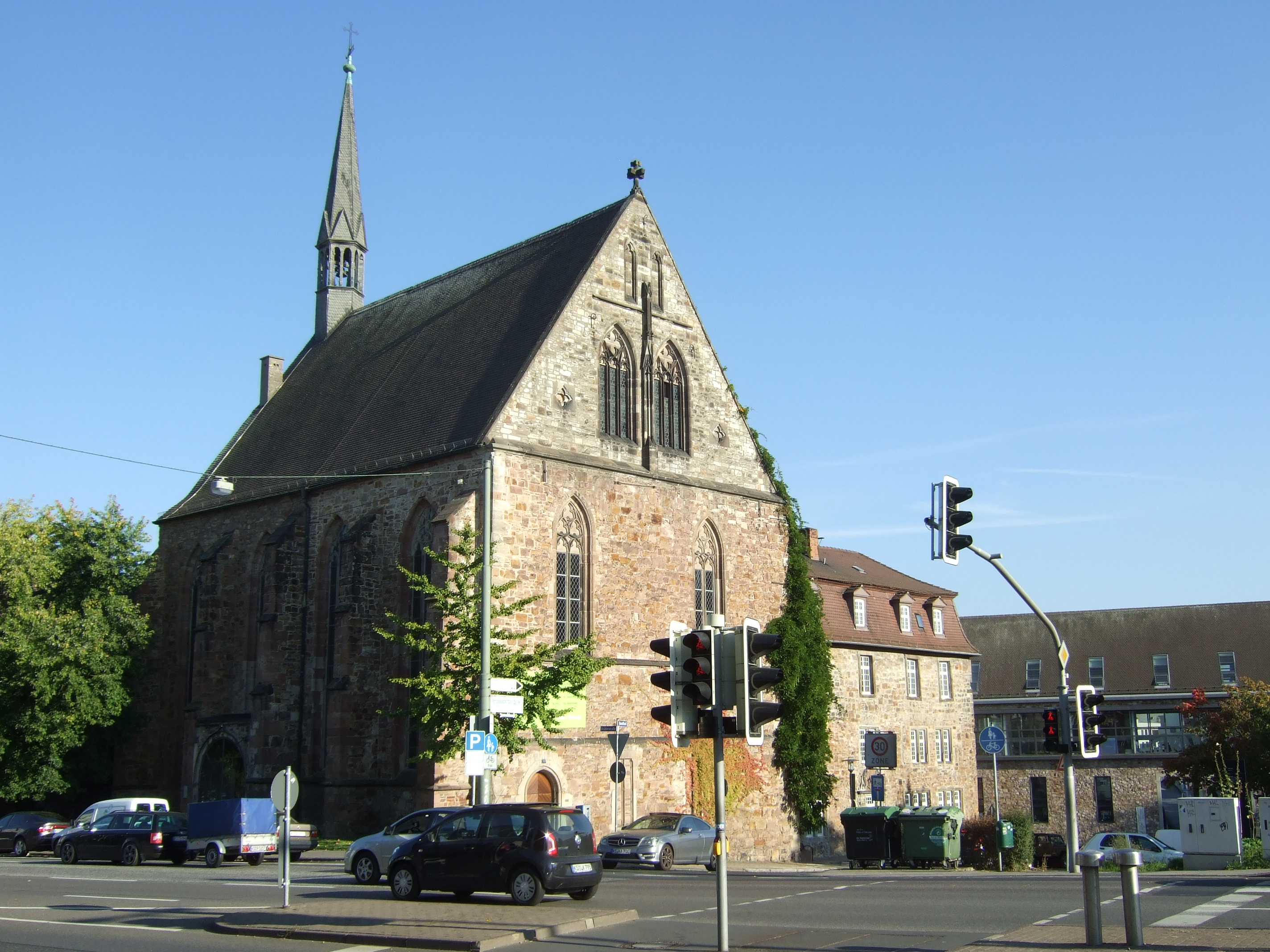 Alte Brüderkirche Kassel